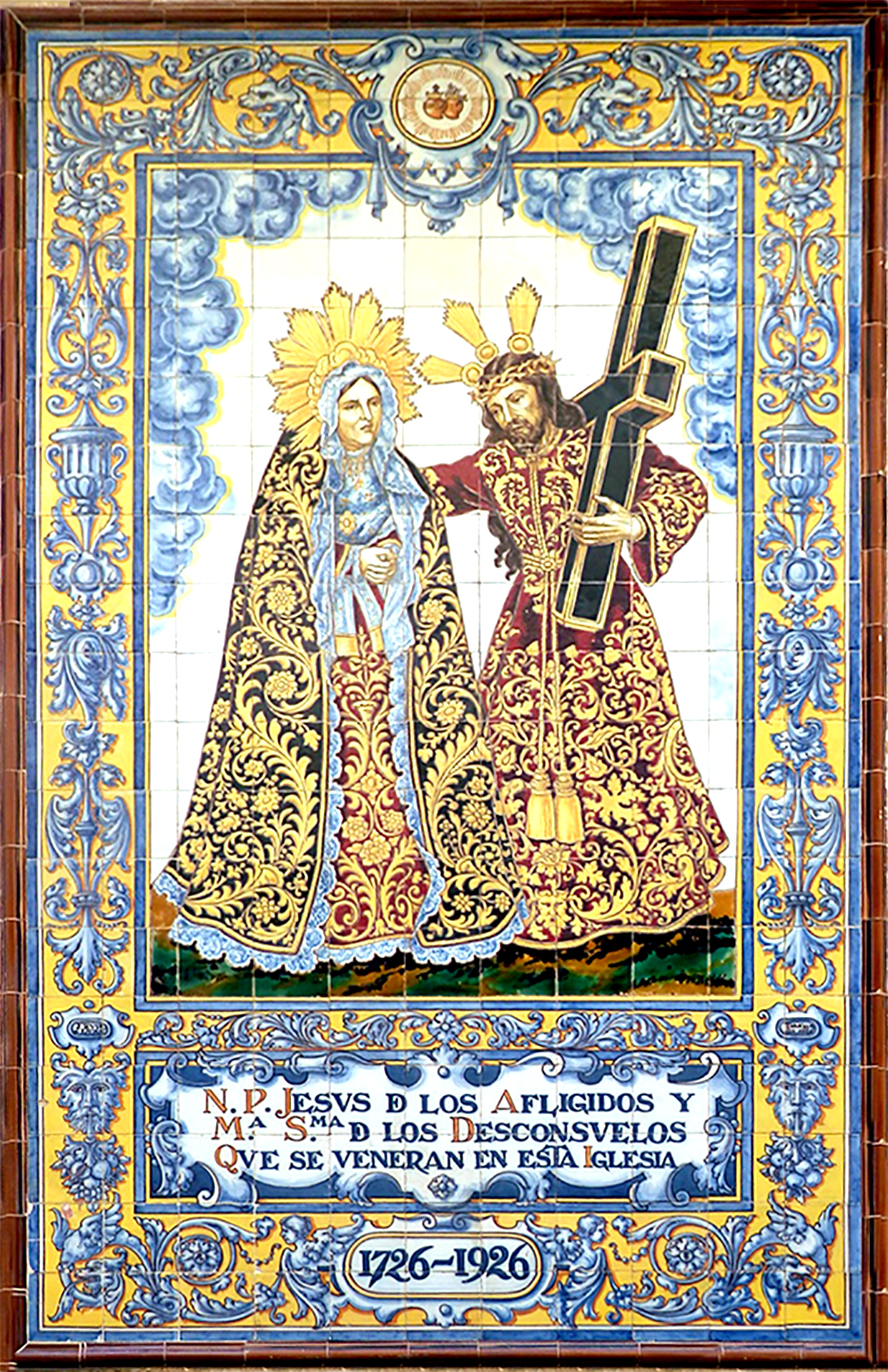 1926 Cerámica Ruiz de Luna. Iglesia San Lorenzo Martir. Cadiz.